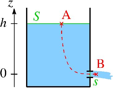 Illustration pour la démonstration de la formule de Torricelli